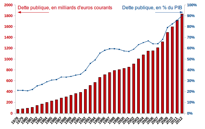 graphique, évolution de la dette des administrations publiques, en France, en pourcentage du PIB, et en milliards d'euros (courants) entre 1978 et 2008